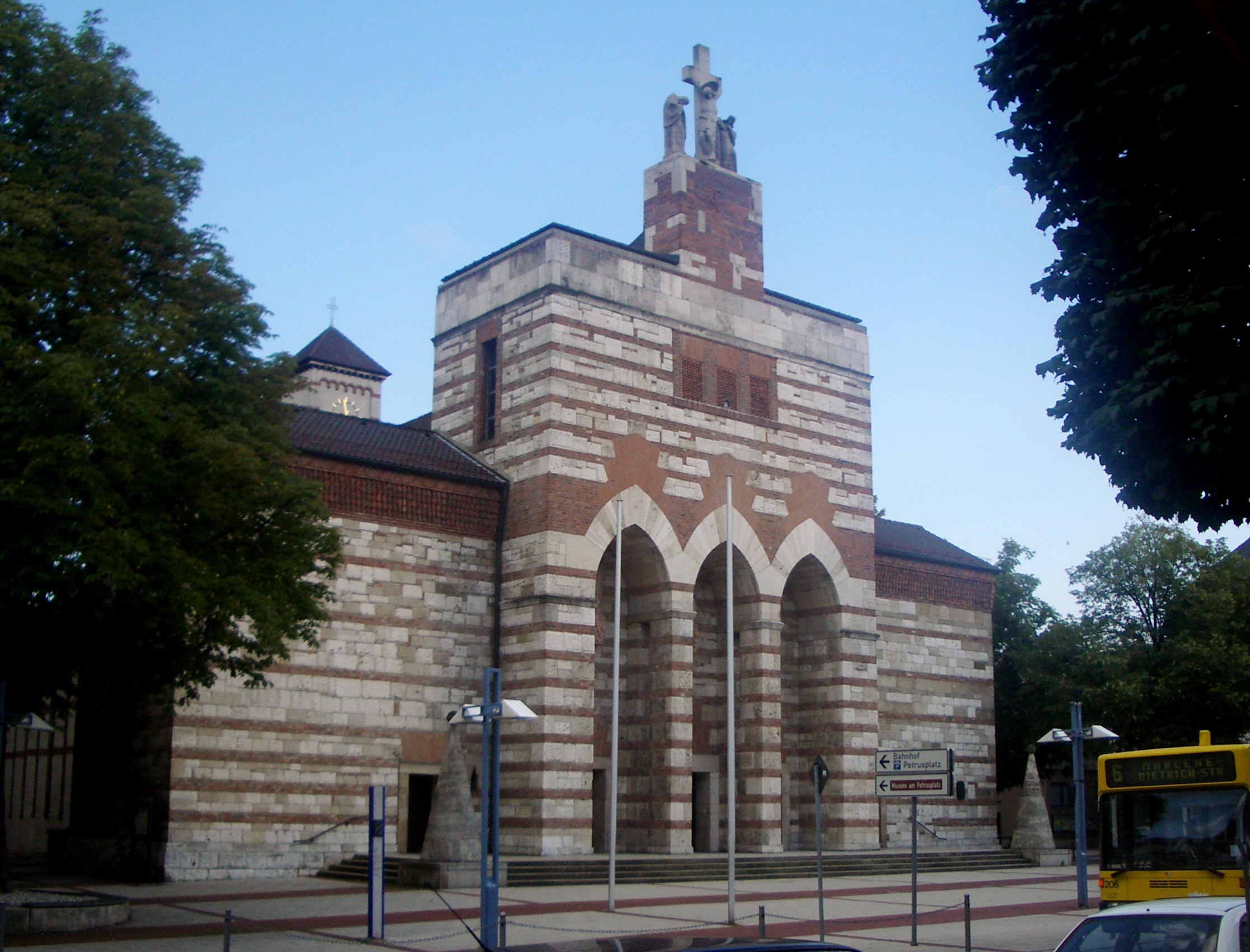 Kirche St. Johann Baptist, Neu-Ulm Architekt: Dominikus Böhm